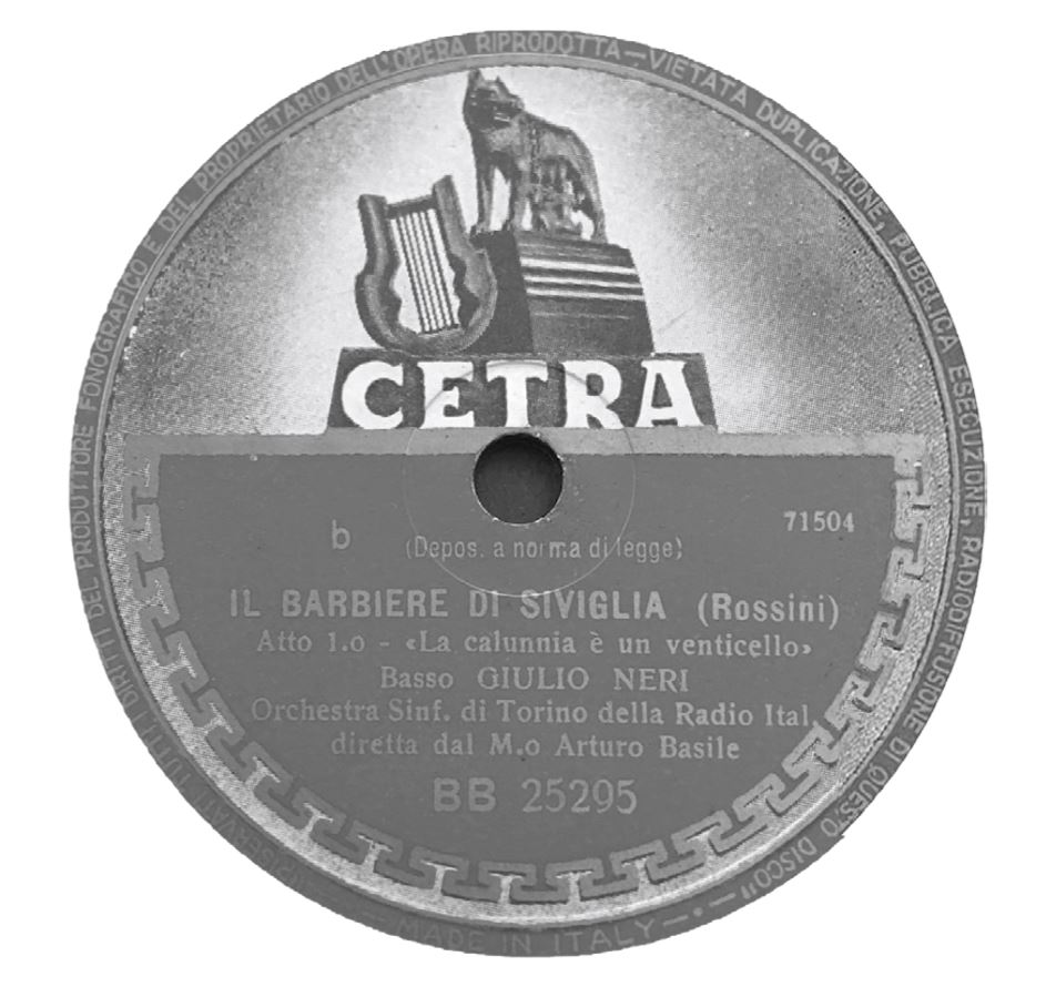 una incisione 78 giri (Cetra) di Neri, anno 1951